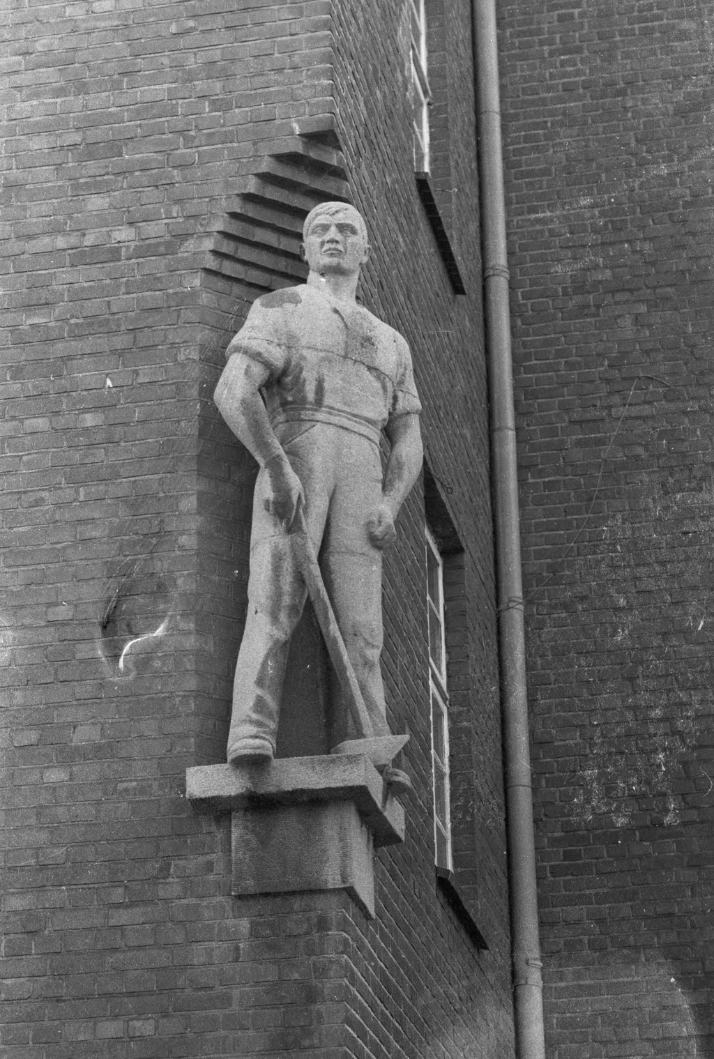 an der Außenfassade von Haus 4 des Seefischmarkts in der Wischhofstraße 1-3 in Wellingdorf.